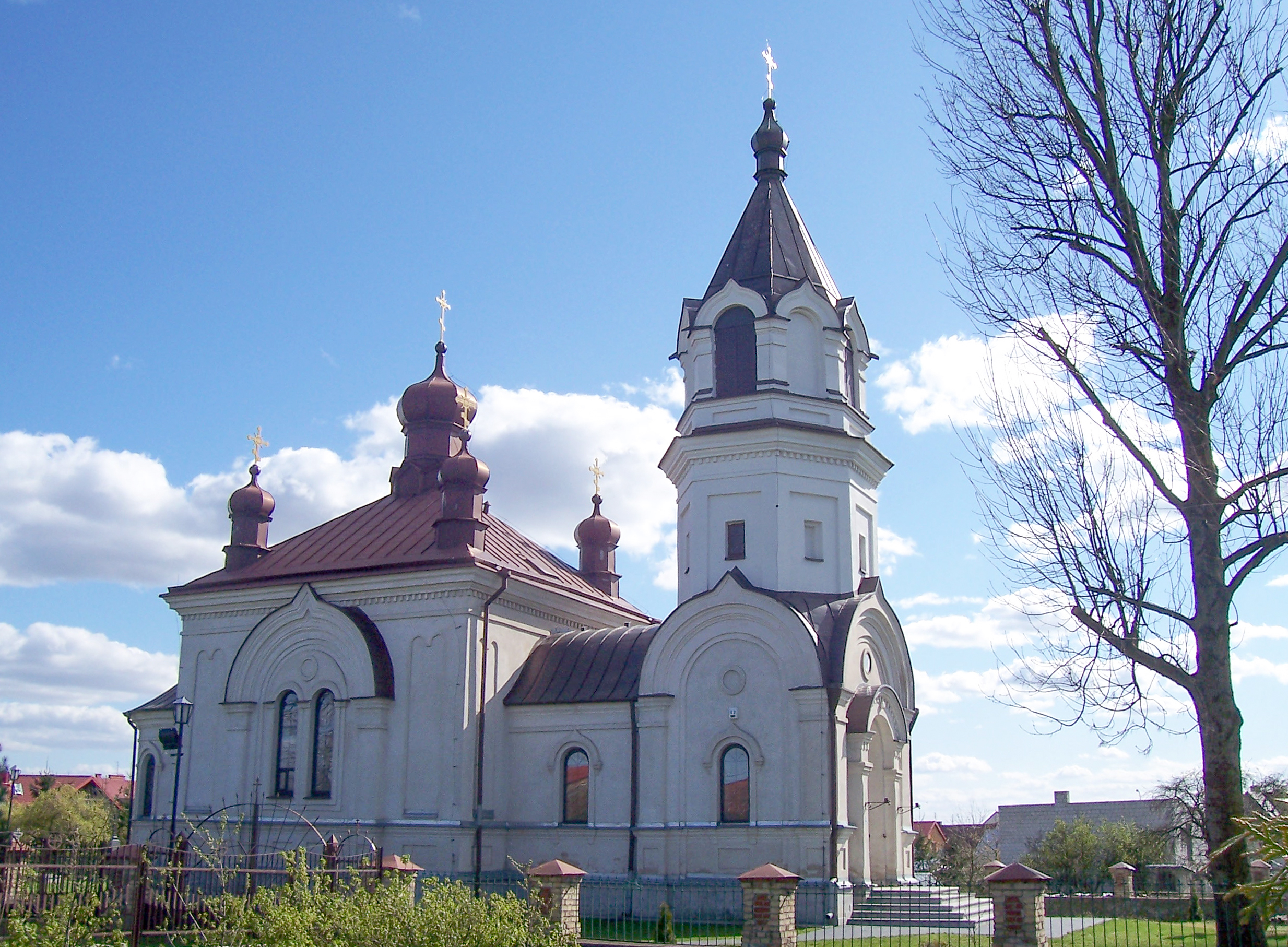 cerkiew prawosławna par. p.w. Matki Boskiej Opiekuńczej Choroszcz, Choroszcz 11.1987.